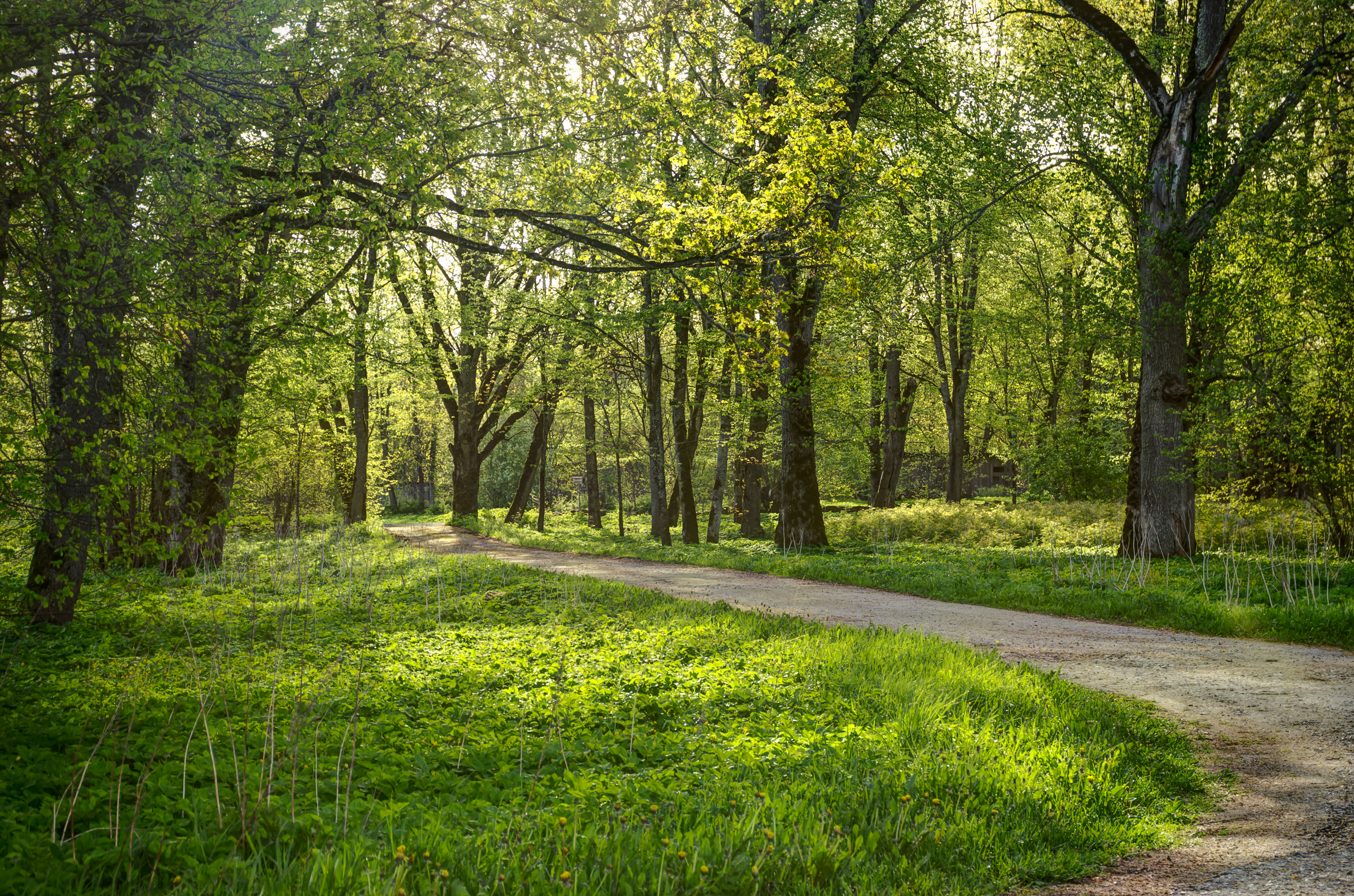 Esna mõisa park